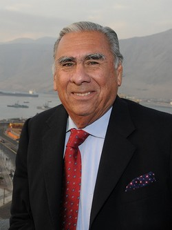 Jorge Alejandro Soria Quiroga, operador naviero y político chileno